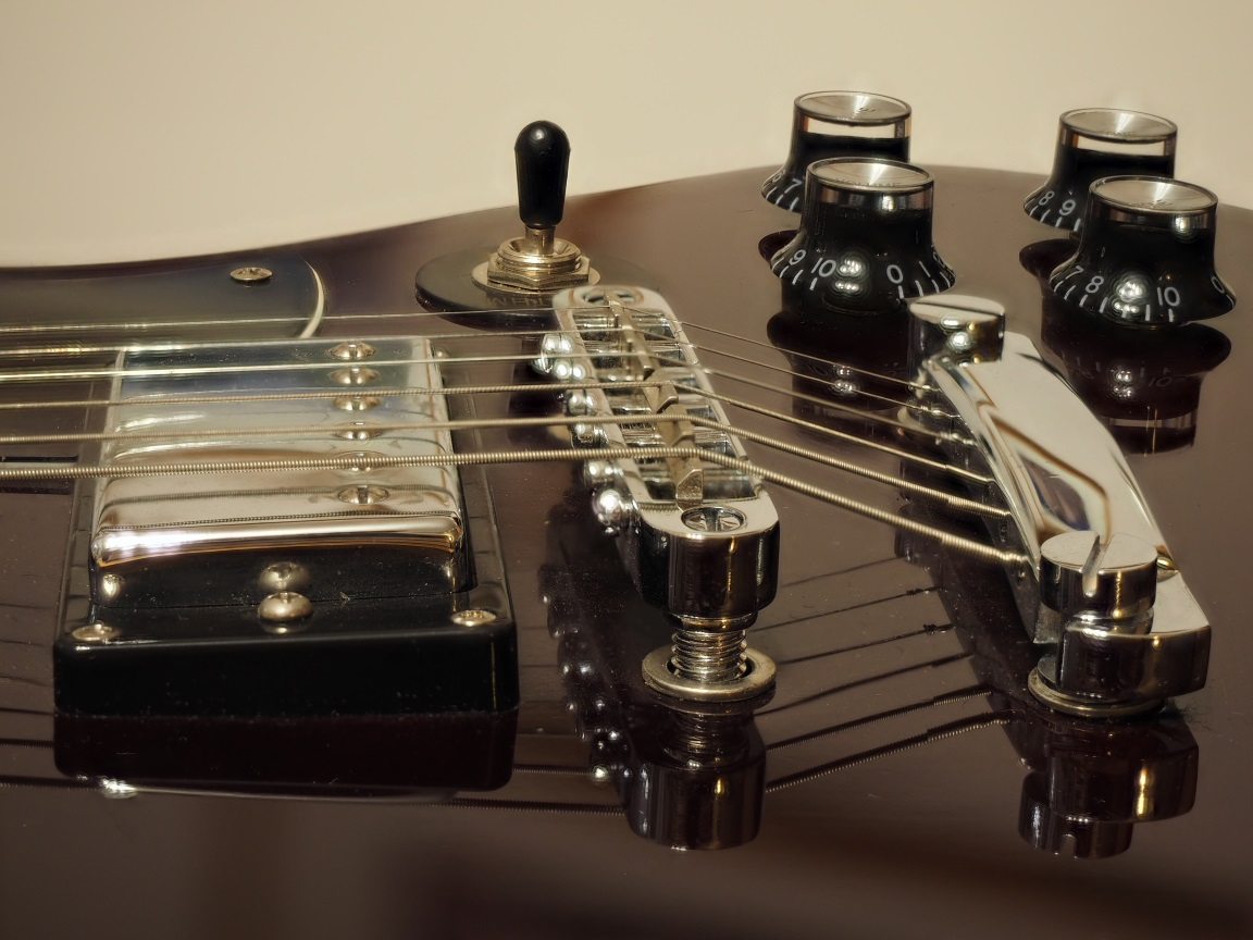 Aus sechs Einzelaufnahemen mit Fokus-Stacking komponierte Aufnahme eines Humbucker-Tonaufnehmers einer elektrischen Guitarre